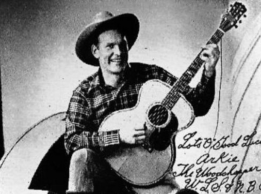 Arkansas Woodchopper